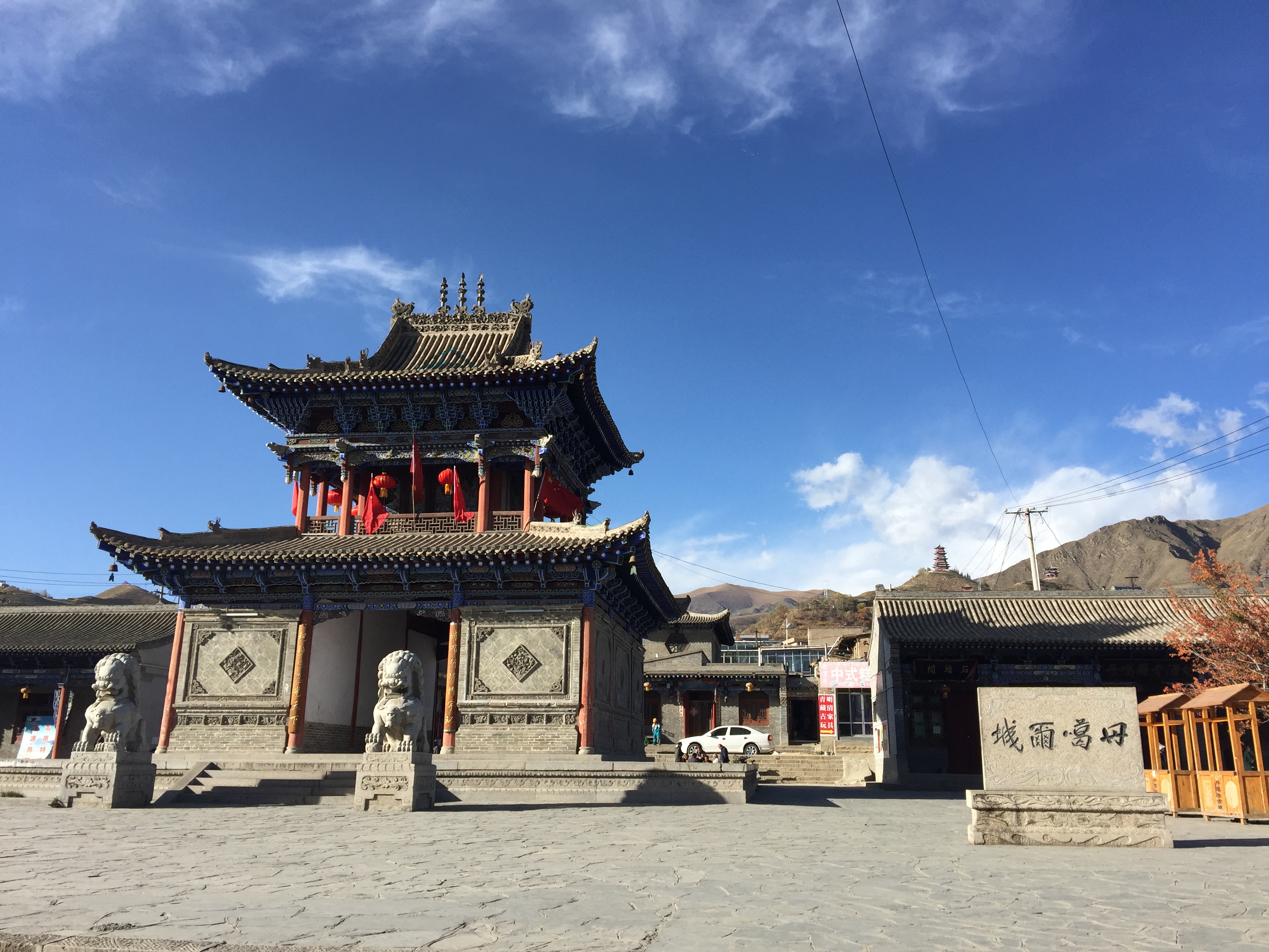 湟源县丹噶尔古城